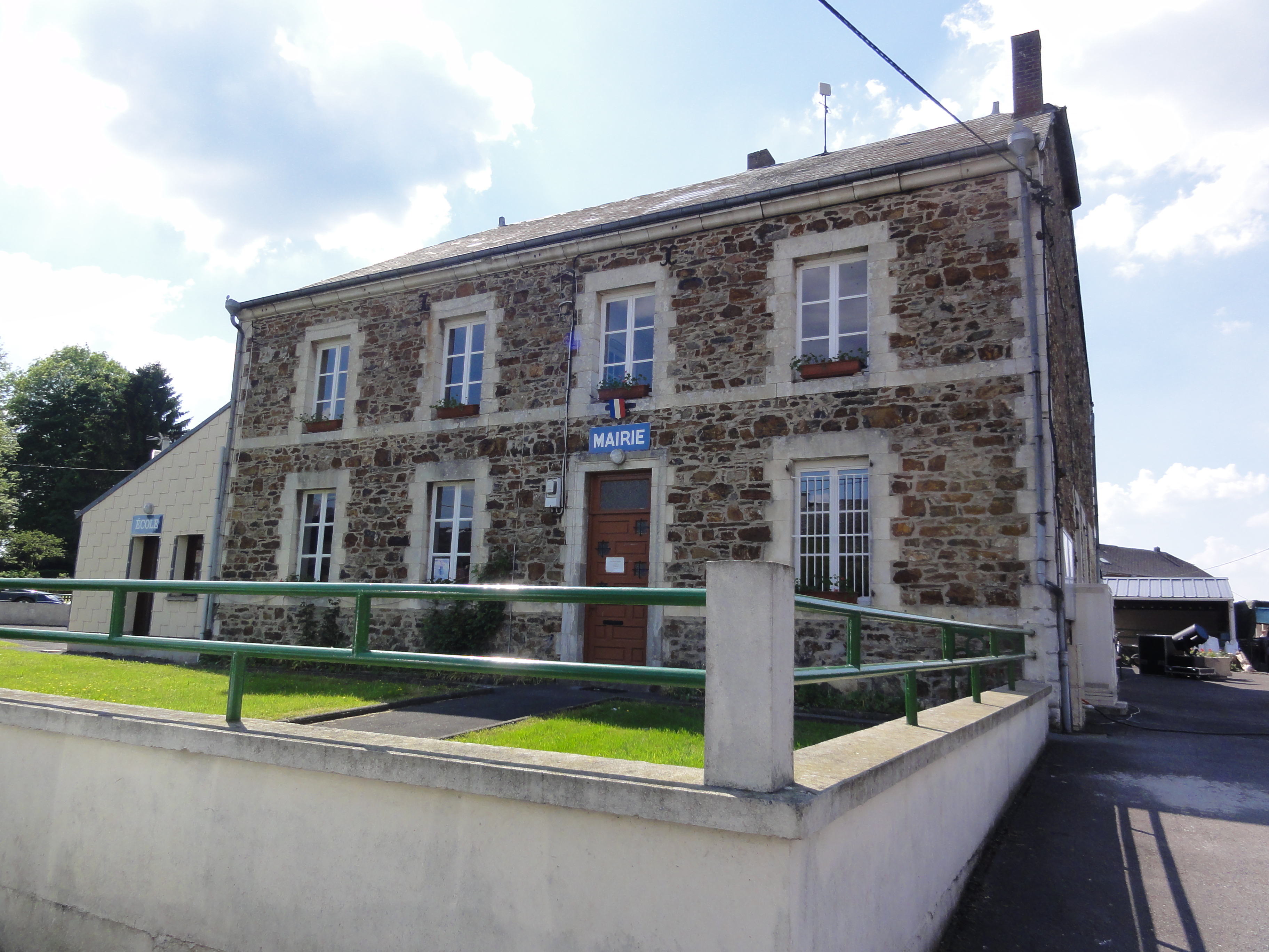 Regniowez (Ardennes, Fr) Mairie